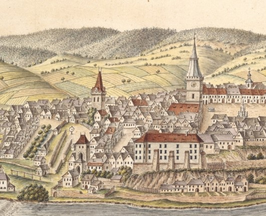 Antonín Jan Venuto: Veduta města Kadaně, detail.